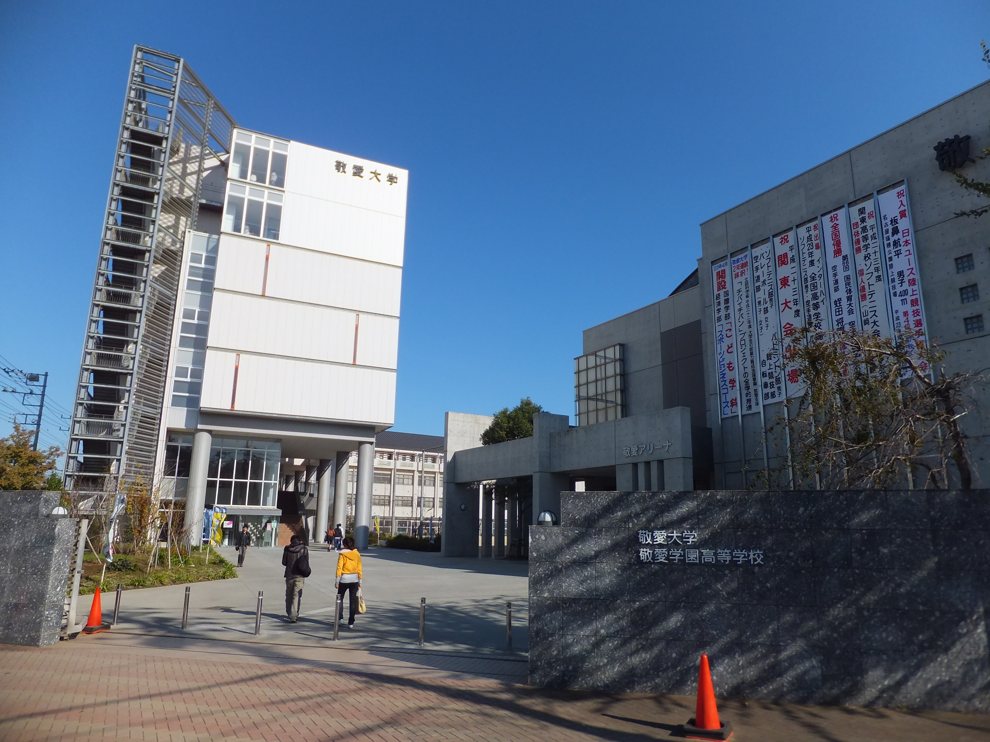 敬愛大学正門